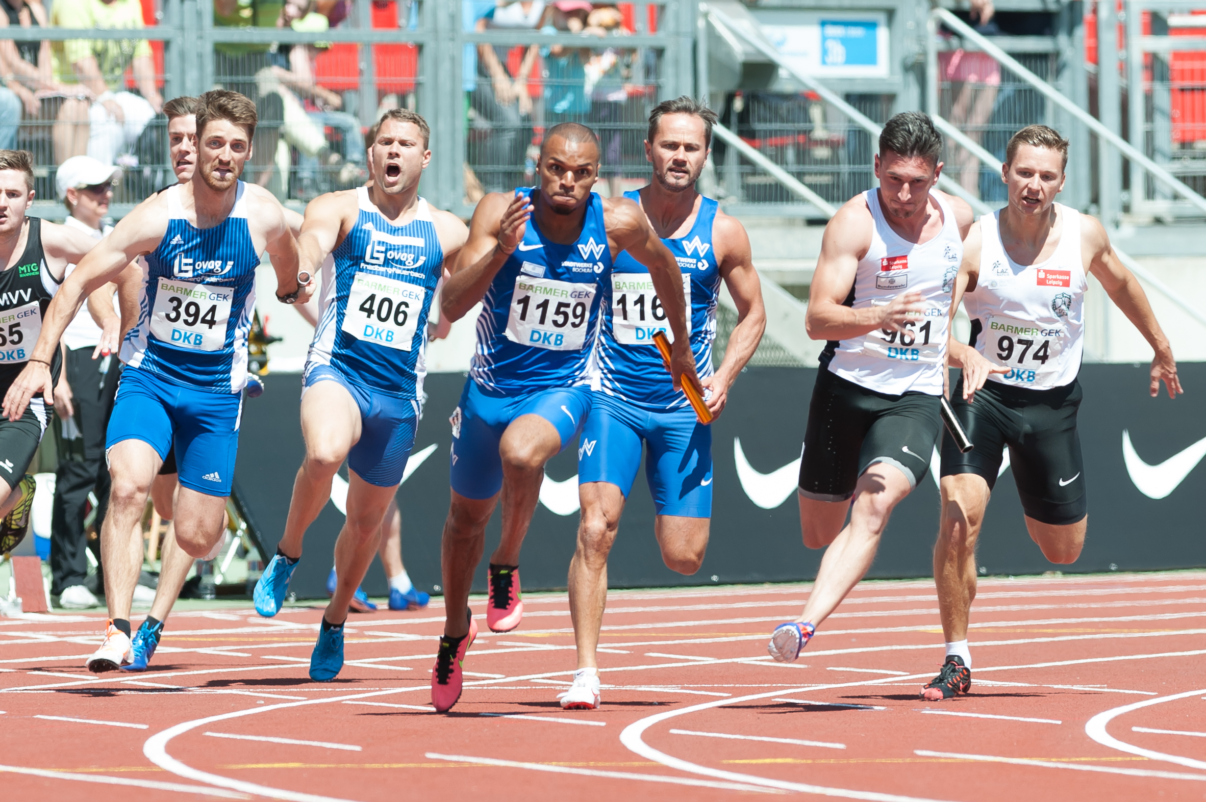 Deutsche Leichtathletik-Meisterschaften 2015: Männer 4x100m - Felix Göltl, Michael Pohl (LG OVAG Friedberg-Fauerbach), Robin Erewa, Alexander Kosenkow (TV Wattenscheid 01), Robert Hering, Roy Schmidt (SC DHfK Leipzig)